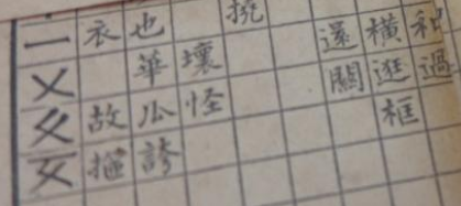 趙雅庭先生所著，神州國光社出版之粵語學習書《民衆識字粵語拼音字彙》中華民國二十年原版。圖中展示了「ㄧ、ㄨ、ㆼ、ㆽ」聲母。